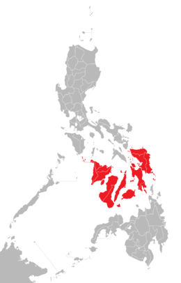 Висајска Остврва на мапи. (Означено црвено)